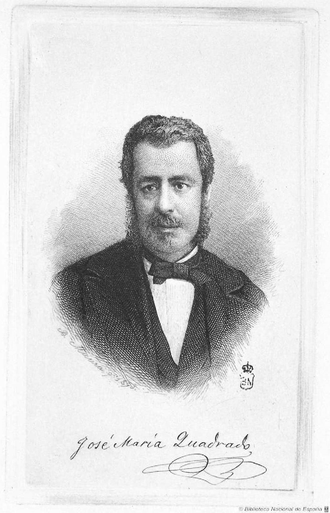 Retrato de José María Quadrado, aguafuerte, Biblioteca Nacional de España